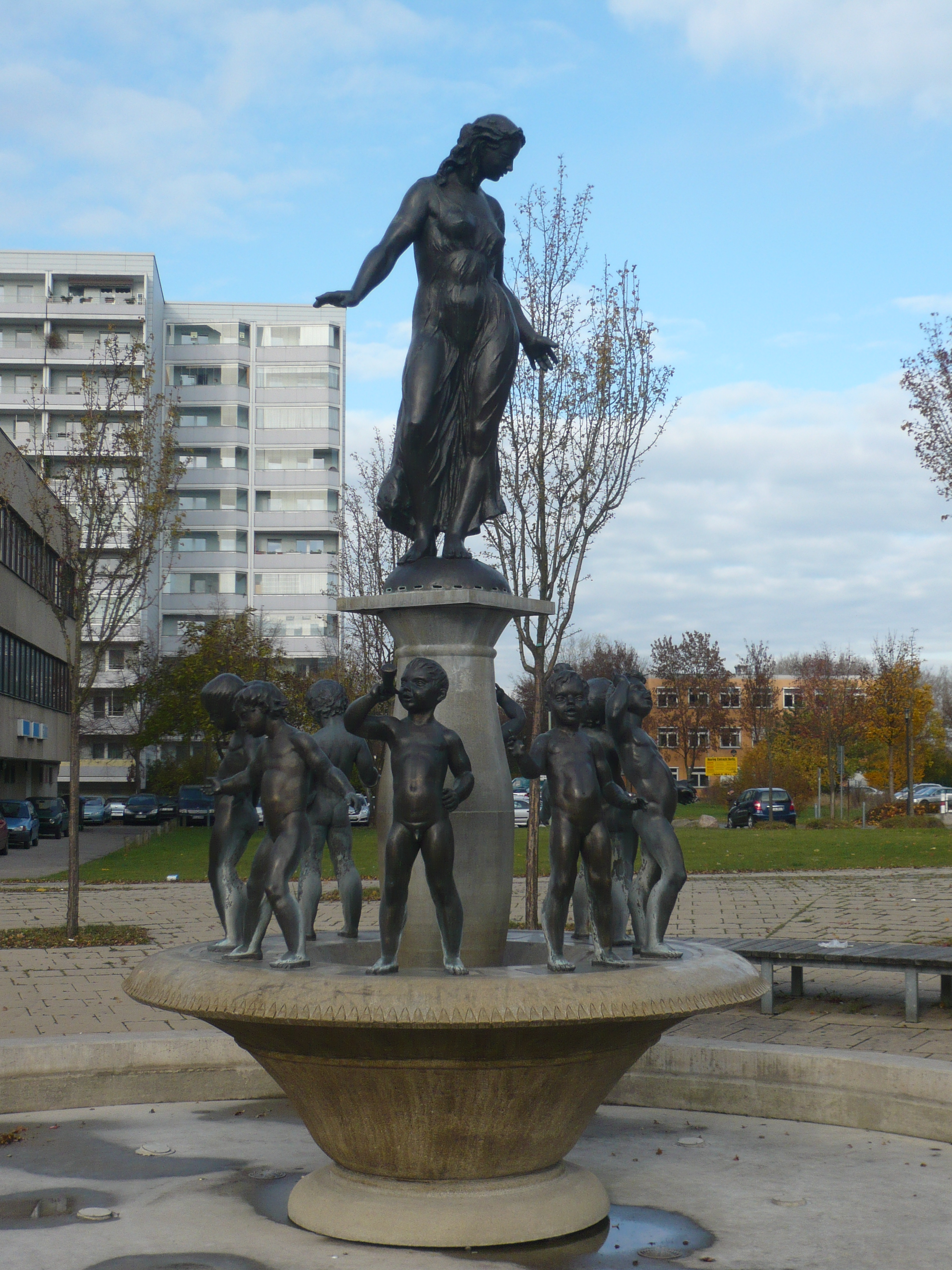 Brunnen der Jugend von Senta Baldamus im Ortsteil Neu-Hohenschönhausen